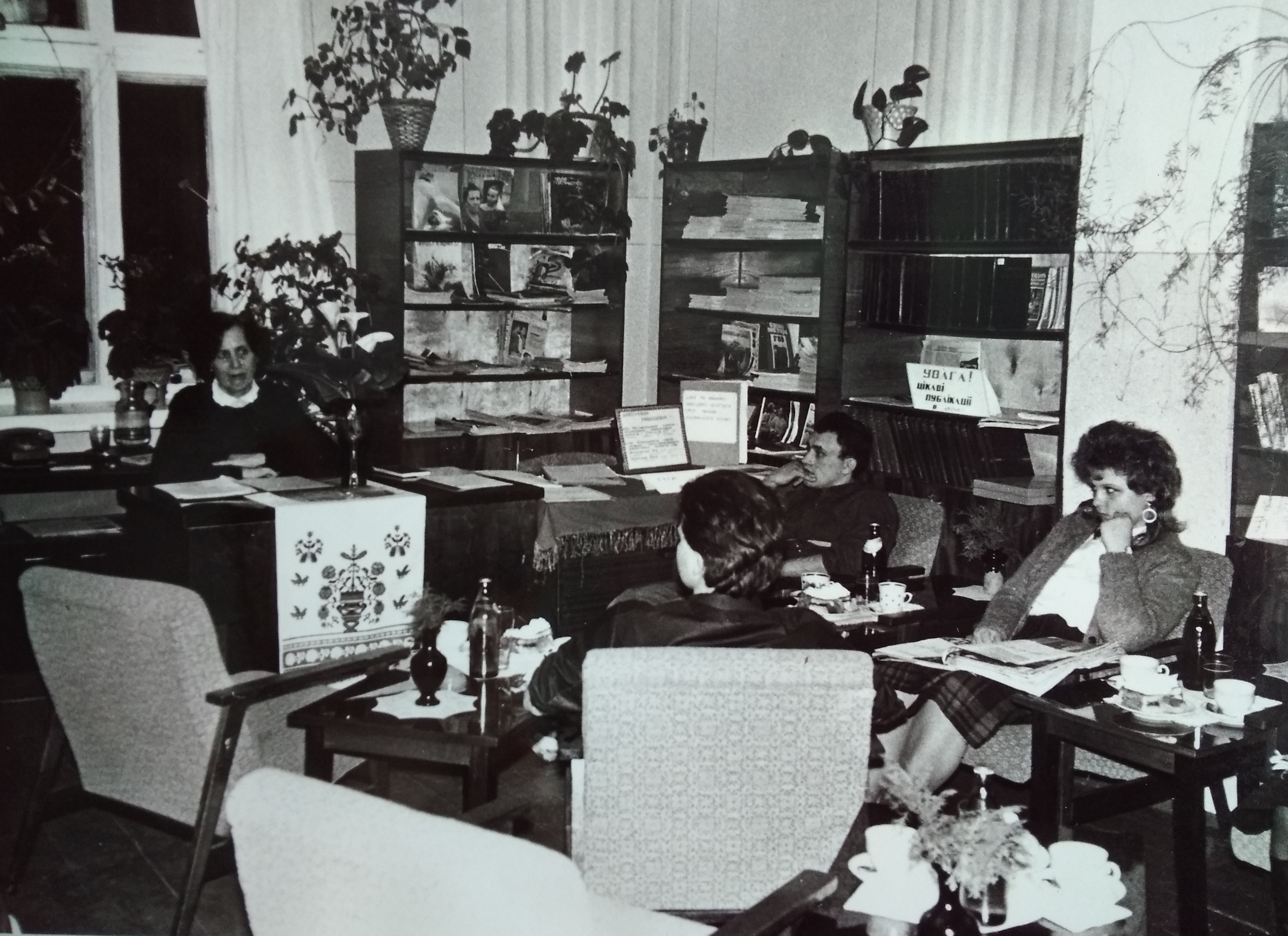 читальни зал